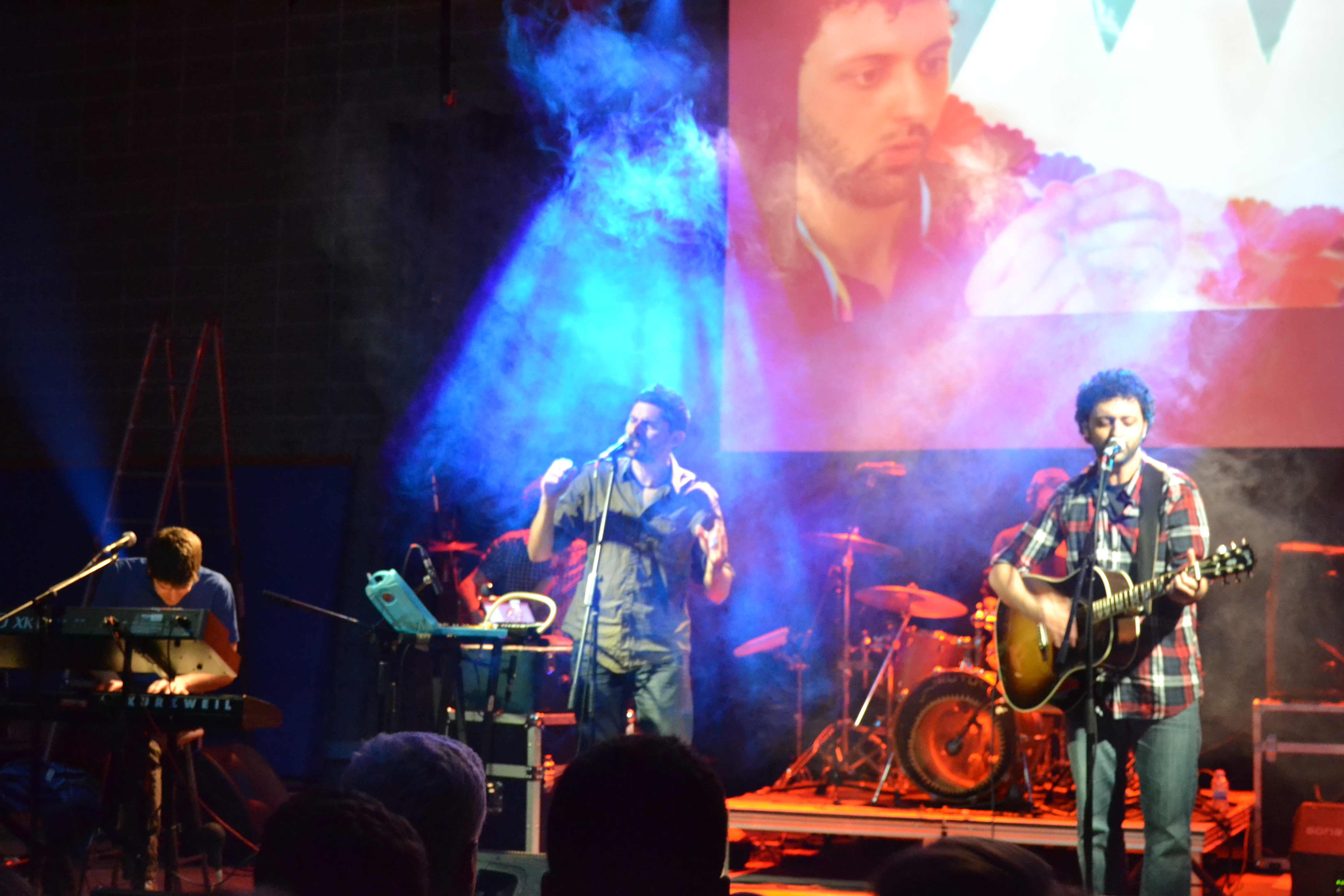 Els Amics de les Arts en el concert a Verges (08-01-2011)